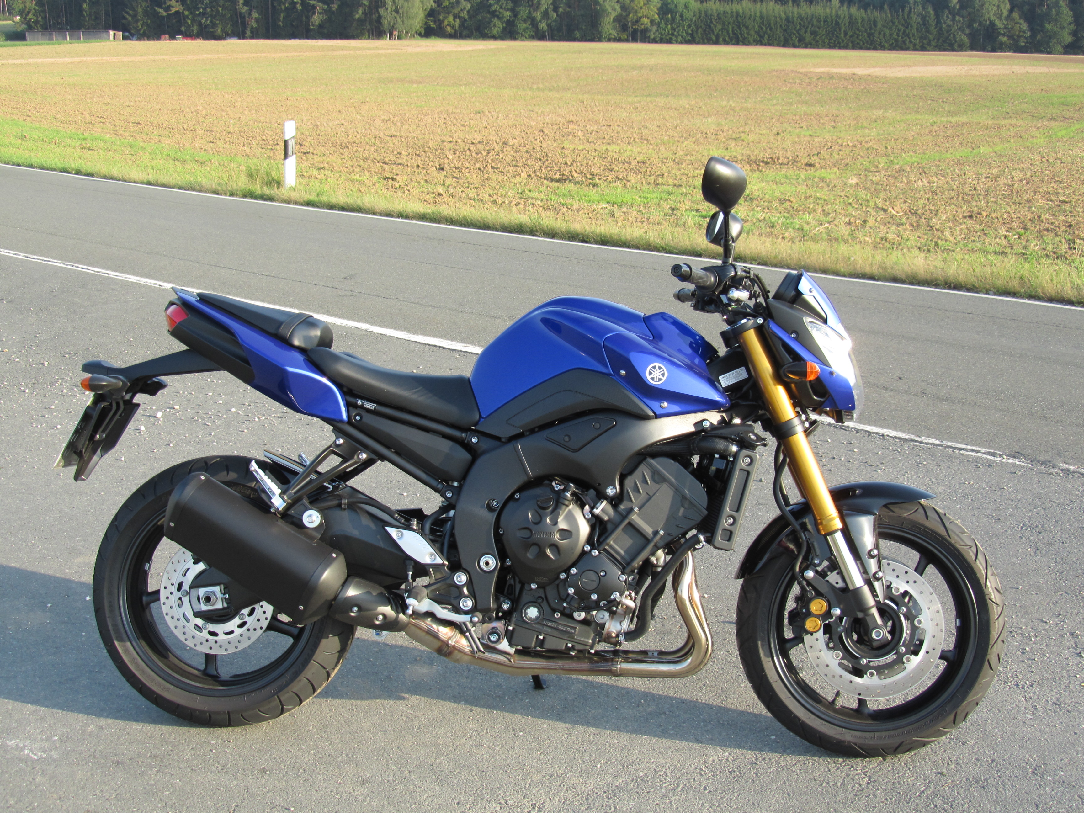 Motorradbild